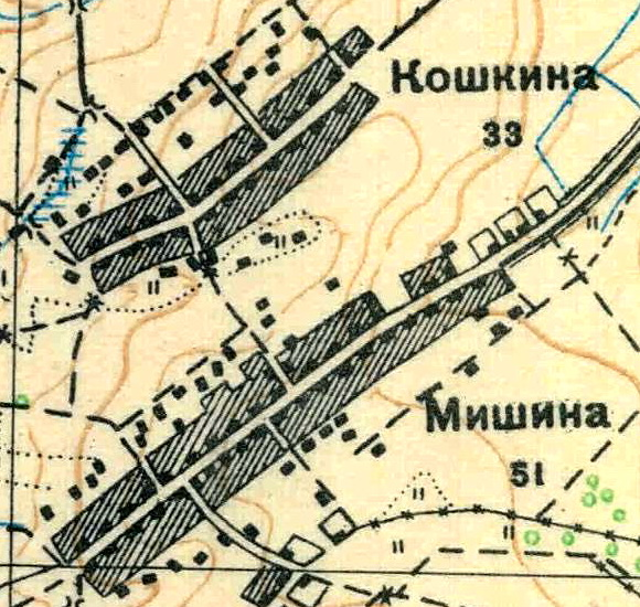 Топографическая карта Ленинградской области, квадрат О-35-9-Г-г (Косколово), деревни Кошкино и Мишино